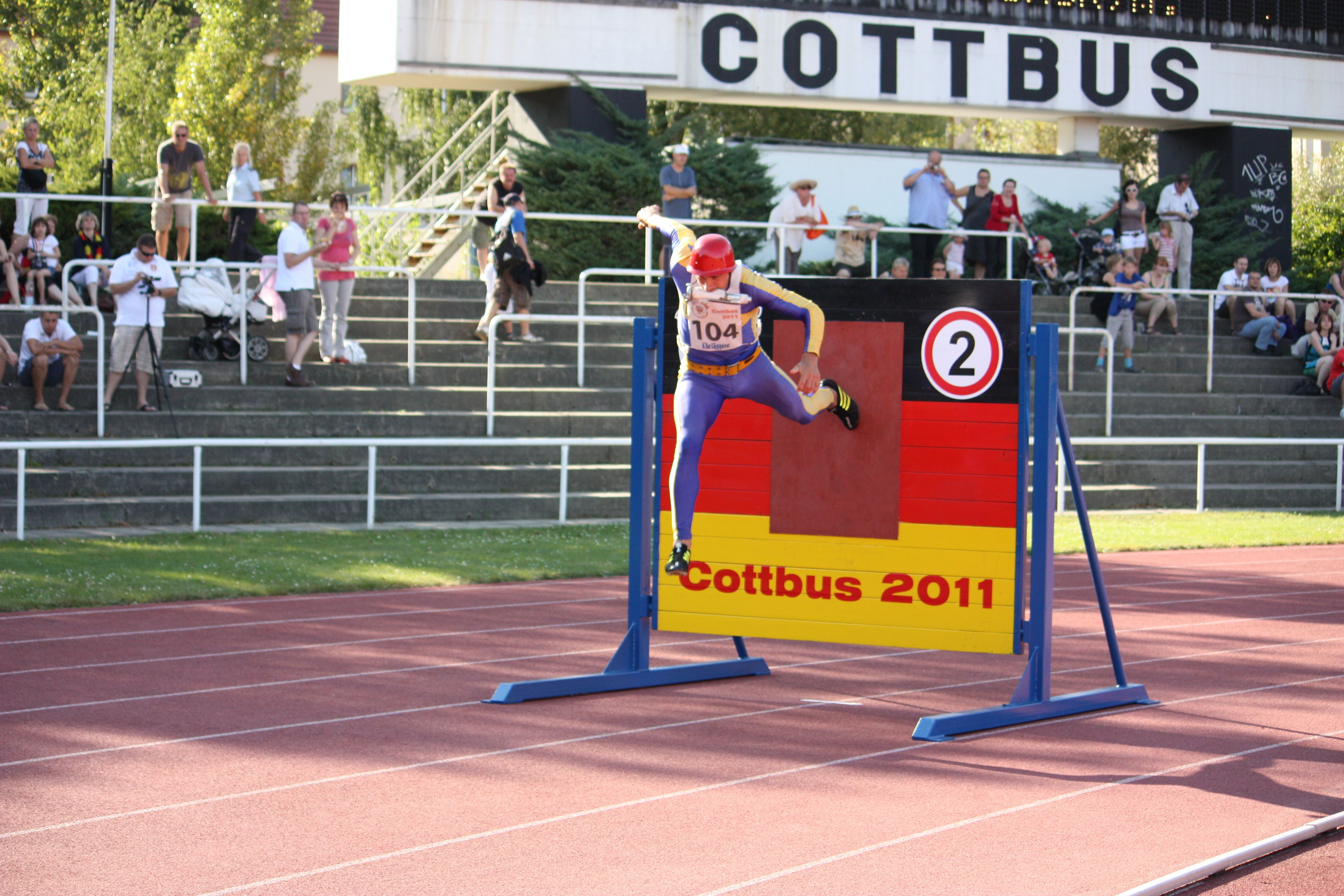 Überqueren der Hinderniswand bei der 4x100-Meter-Feuerwehrstafette bei der 7. WM im Feuerwehrsport in Cottbus